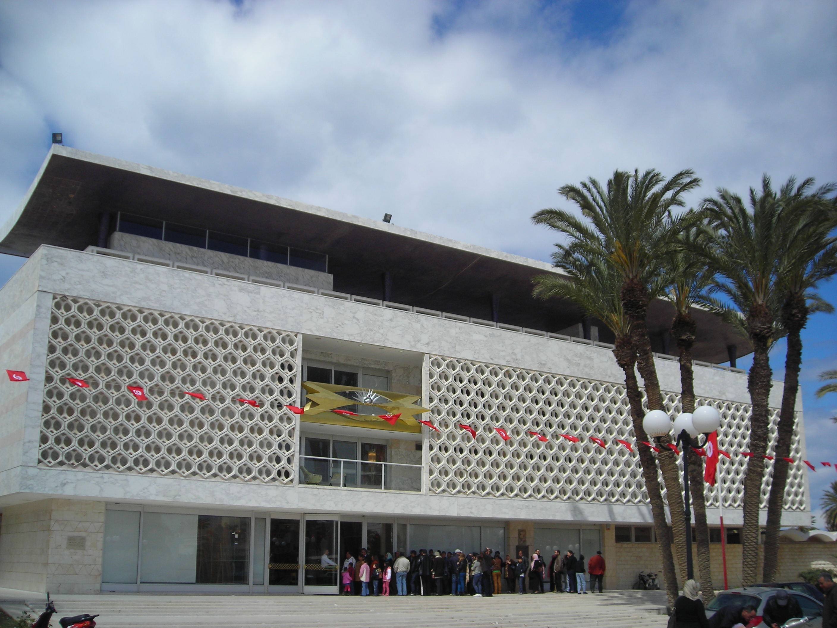 Vue externe du Musée Habib Bourguiba à Monastir